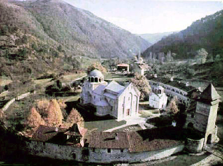 Studenica